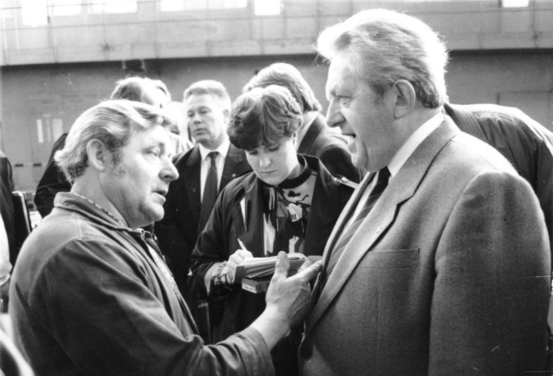 Kombinat Umformtechnik Erfurt, Gerhard Müller ADN-ZB/Hirndorf/16.10.89 Erfurt: Gespräch mit Arbeitern Der Kandidat des Politbüros des ZK der SED Gerhard Müller (r), 1. Sekretär der SED-BL, führte im Stammbetrieb des Kombinates Umformtechnik Gespräche mit Arbeitern und informierte über die Politbüro-Erklärung. Der seit 33 Jahren im Dreischichtbetrieb arbeitende Portalfräser Günter Berger (l) kritisiert in dem vertrauensvollen Dialog unter anderem die unzureichende Qualität des Werkküchenessens und die mangelhafte Bereitstellung von Ersatzteilen für PKW. Abgebildete Personen: Müller, Gerhard: Kandidat des Politbüros des ZK der SED, Erster Sekretär der SED-Bezirksleitung Erfurt, DDR